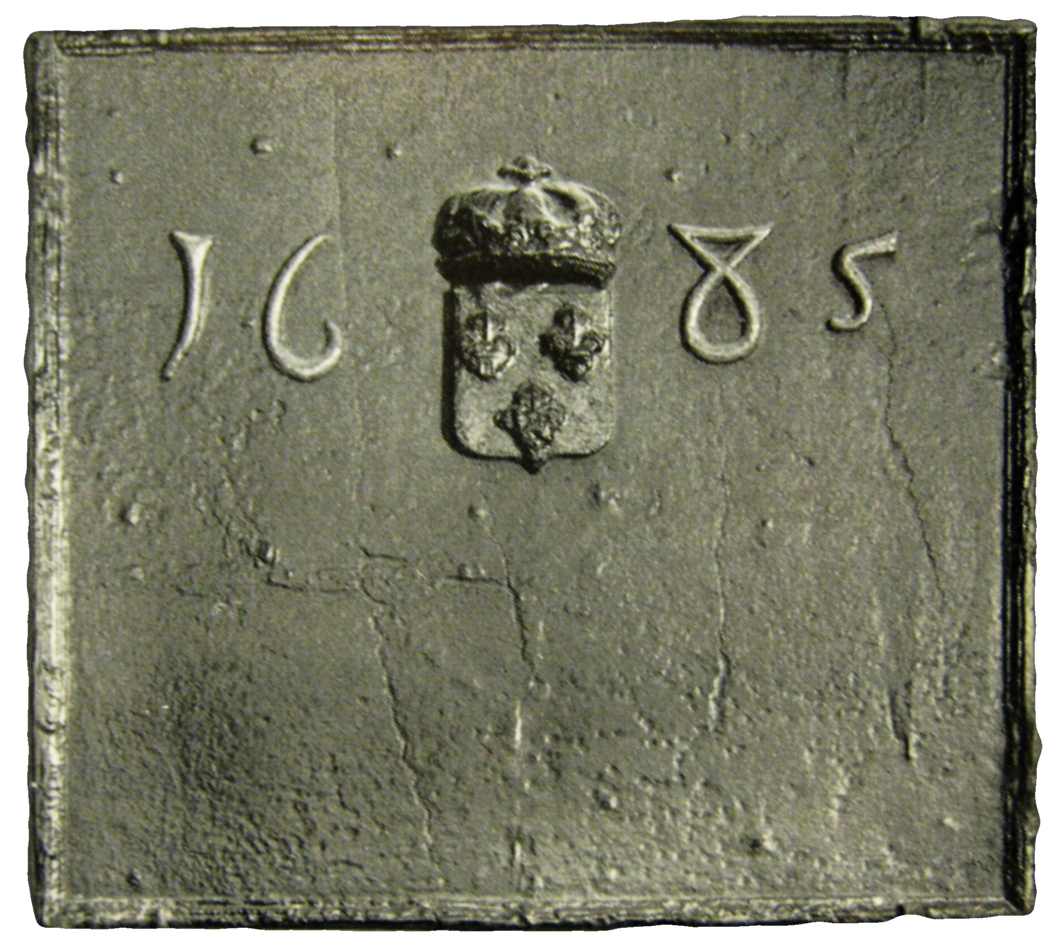 Takenplatte war ein Produkt Dillinger Hütte. Das Lenoncourtsche Wappen war Vorlage für das Firmensymbol